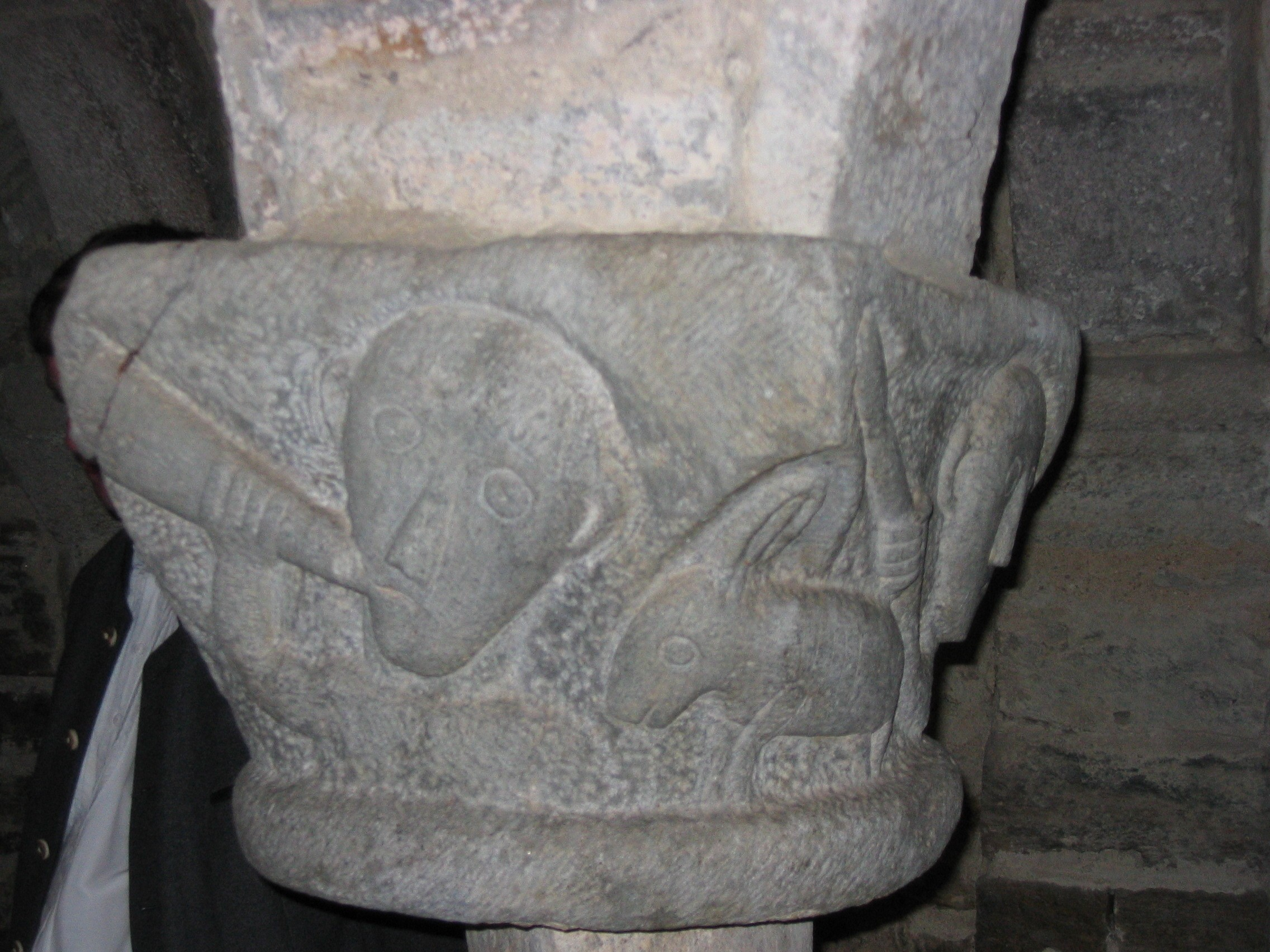 Krypta der Burgkirche auf Oberranna (Mühldorf)